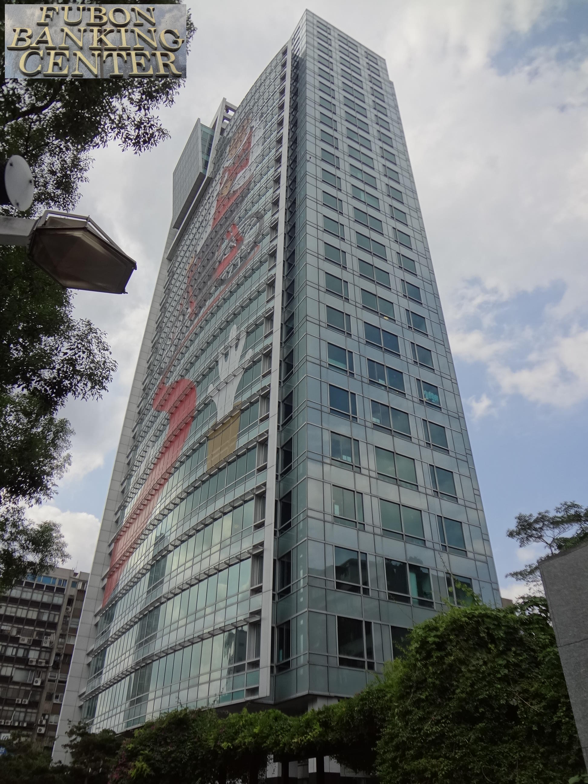 富邦金融中心，位於臺北市大安區仁愛路四段169號。